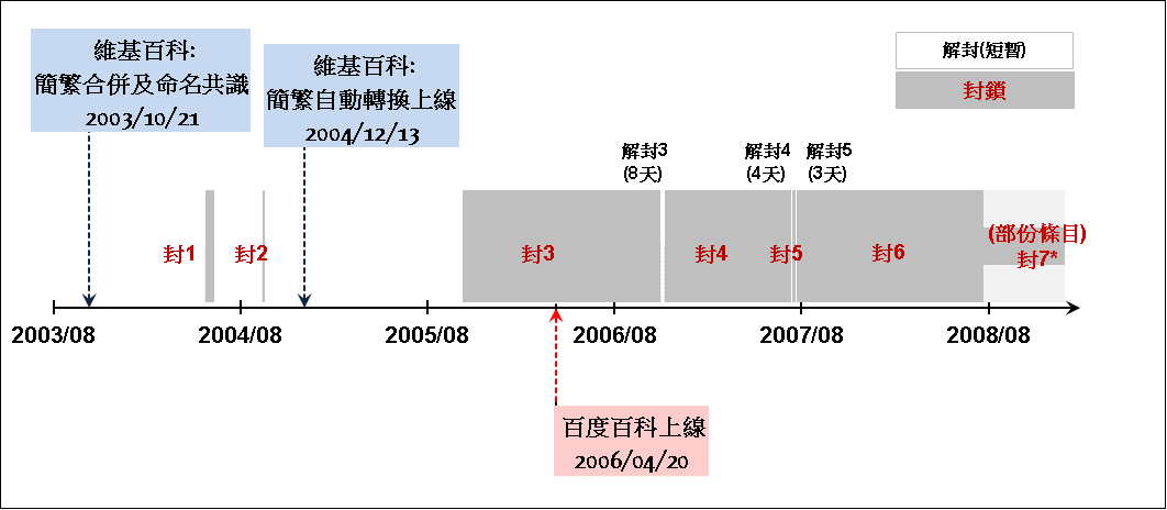 兩網路百科歷史: 百度百科作為後發者